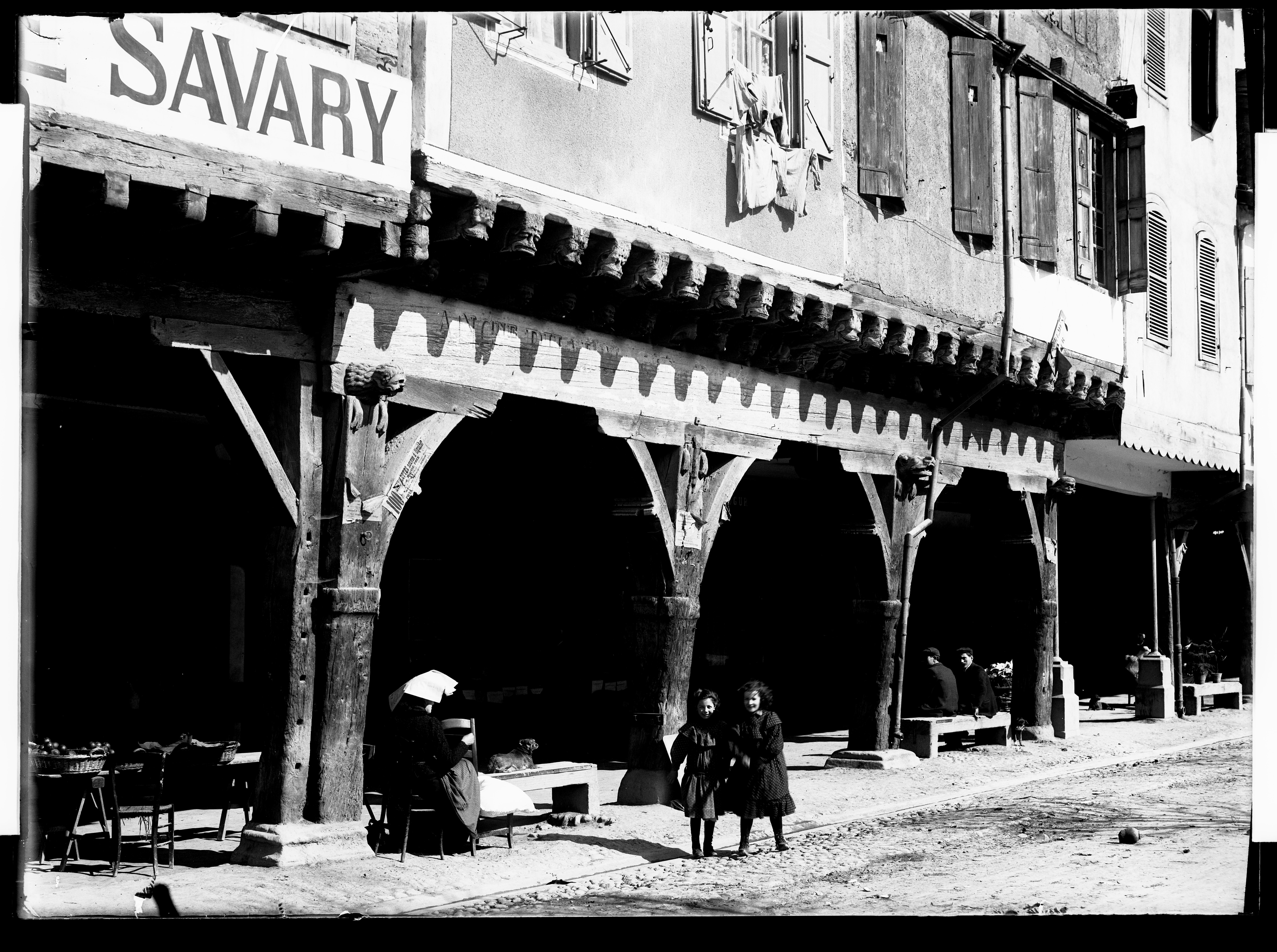 inscription manuscrite par Eugène Trutat sur enveloppe : "Mirepoix : maison de bois avril 1906 obj. Demaria ana. 25 pl. Jougla rose "